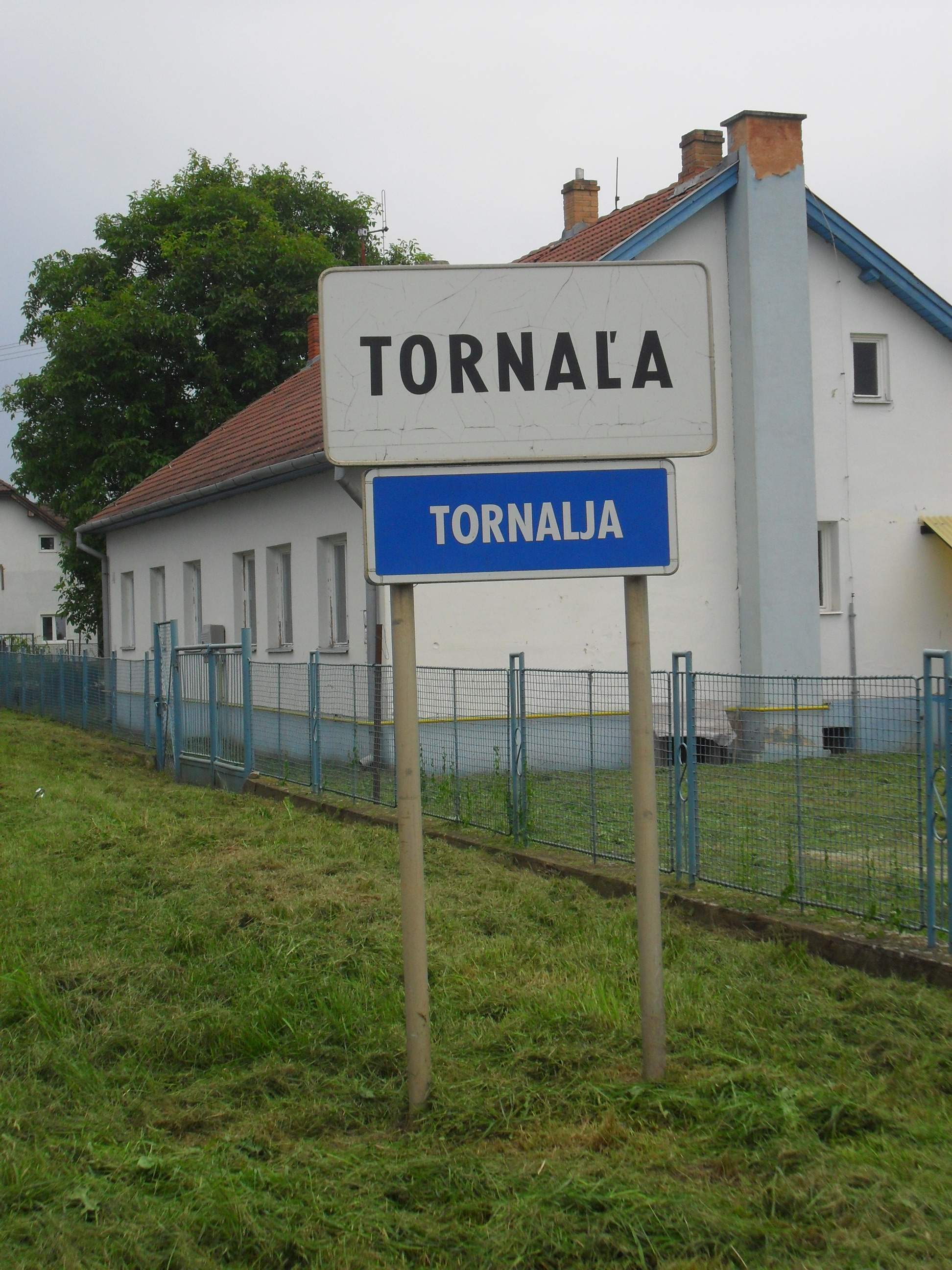 Tornalja - kétnyelvű helységnévtábla